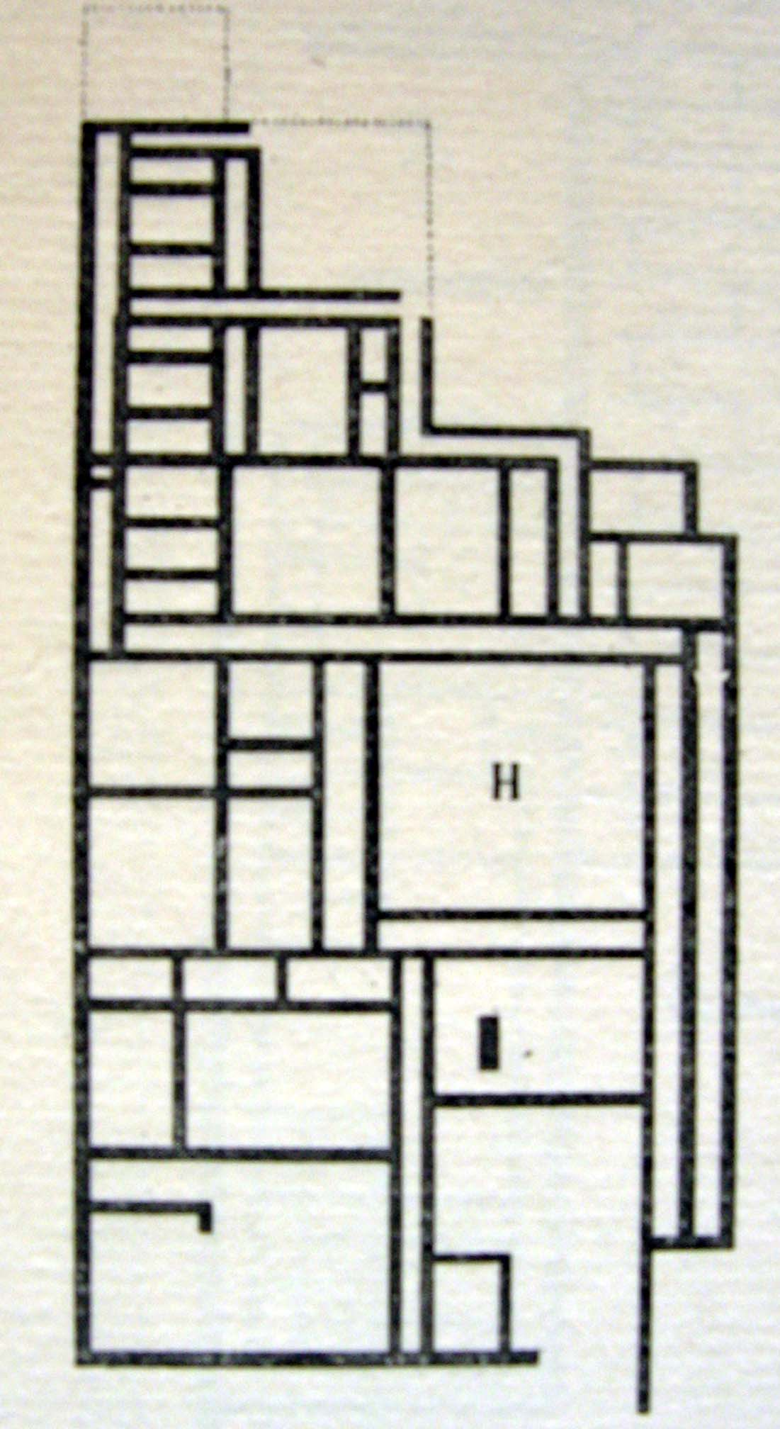 plan des constructions au sud du complexe d'amenemhat III à Dahchour